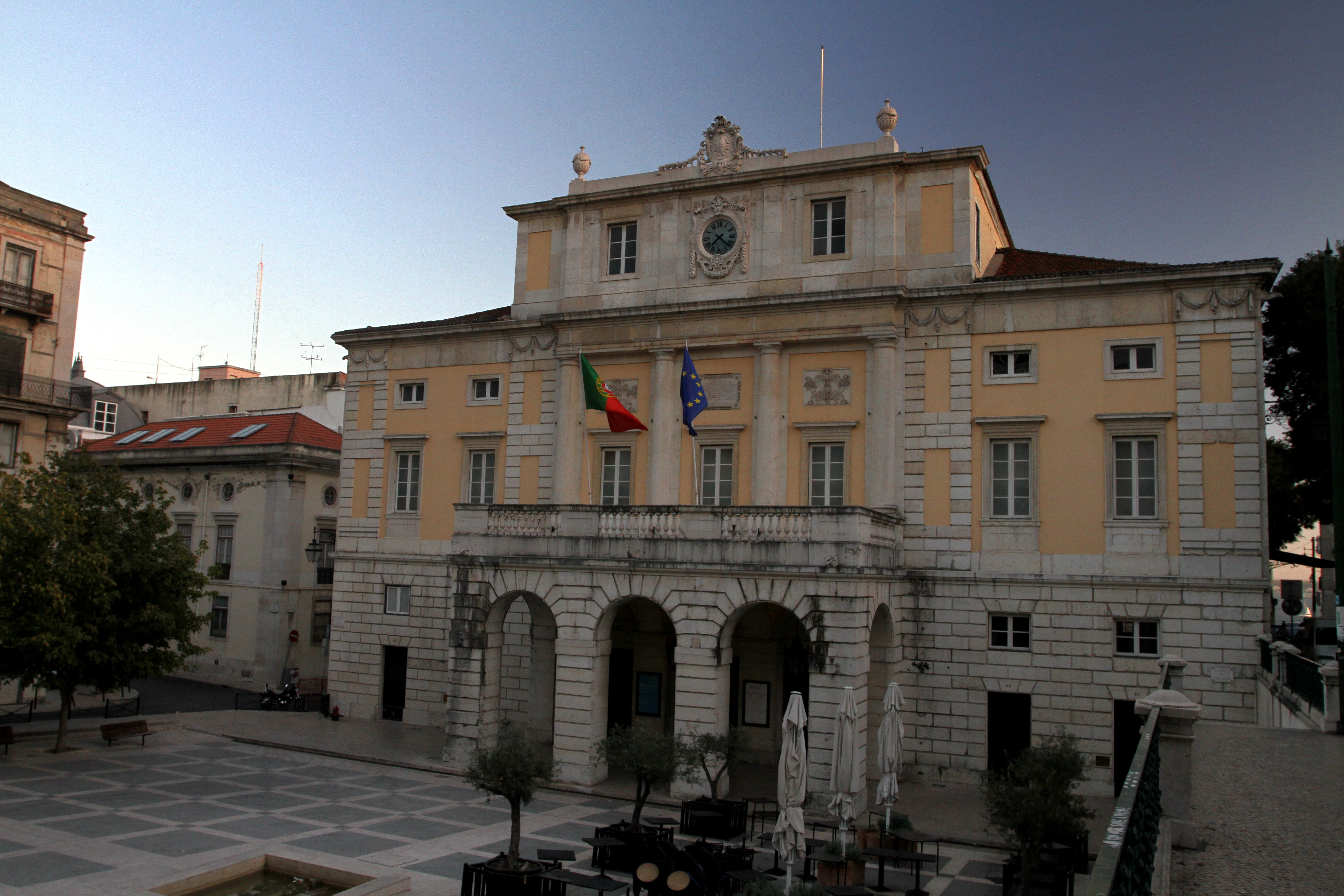 teatro São Carlos - Lisboa This file was uploaded for Wiki Loves Monuments in Portugal with the unique identifier 71093.